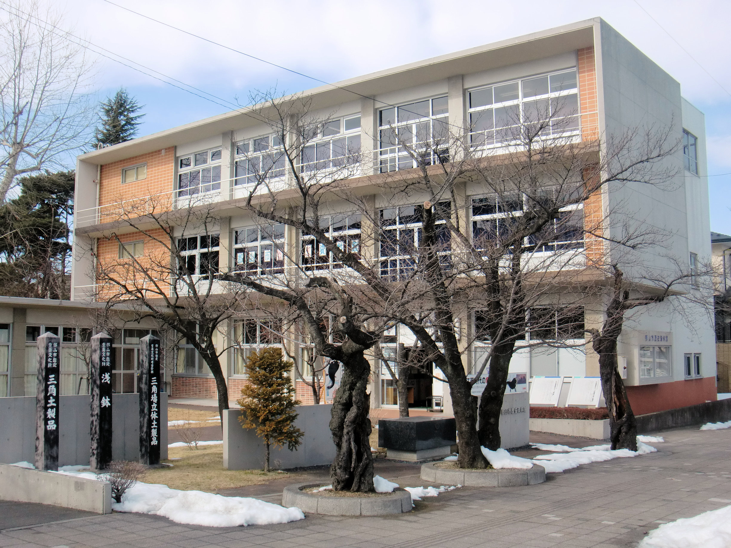 郡山市歴史資料館（旧郡山市図書館）